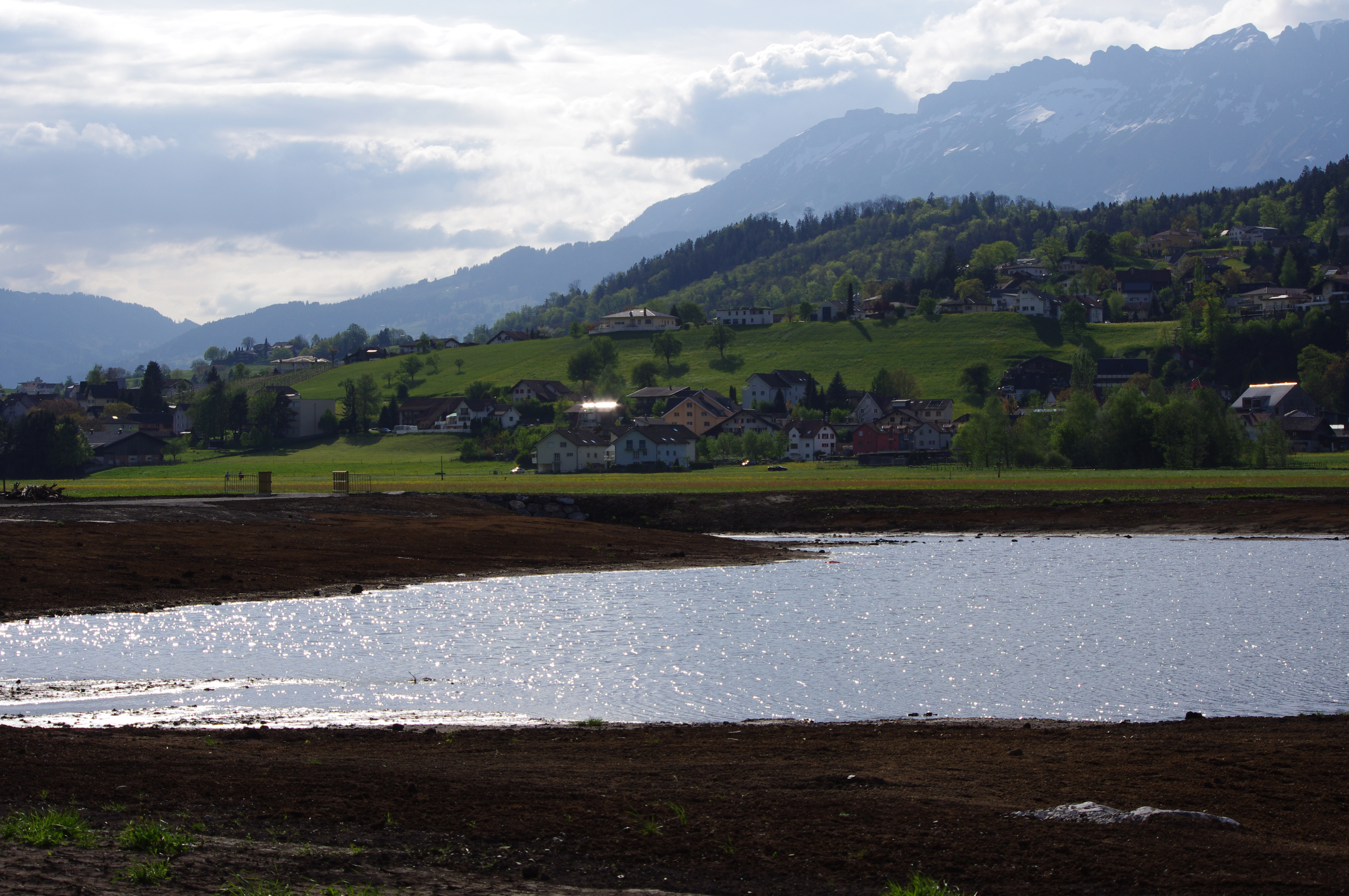 Der Egelsee bei Feldkirch